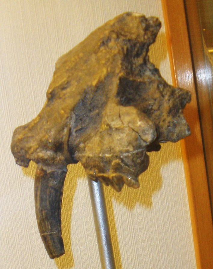 Fossil of Megantereon, an extinct mammal- Took the picture at Museo di Paleontologia di Firenze